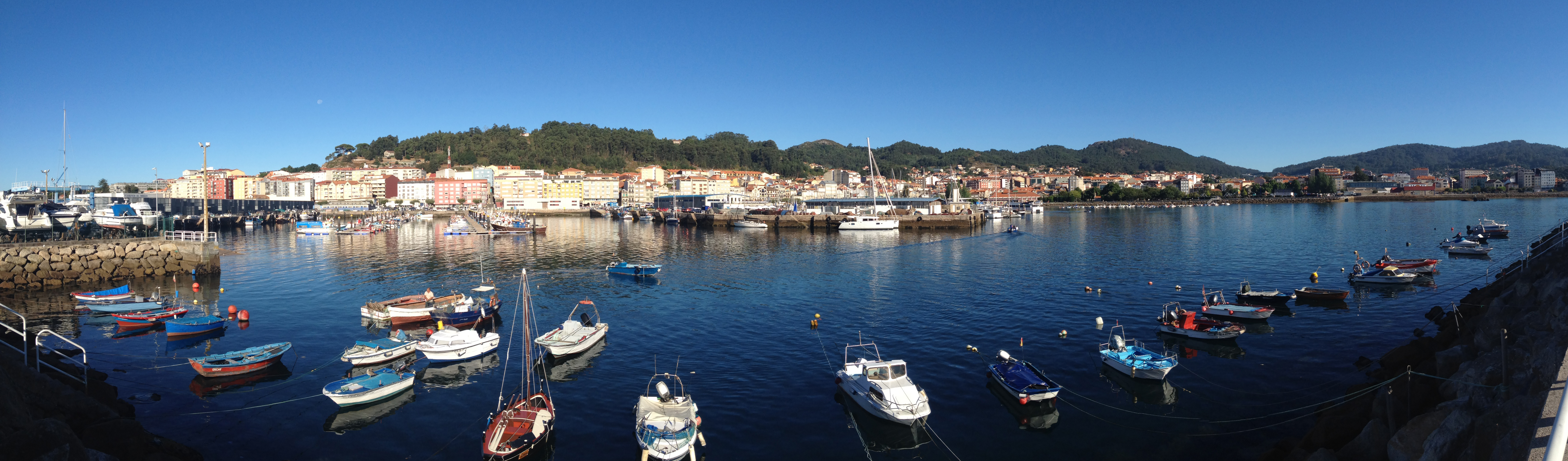 Vista panorámica do peirao de Cangas do Morrazo.